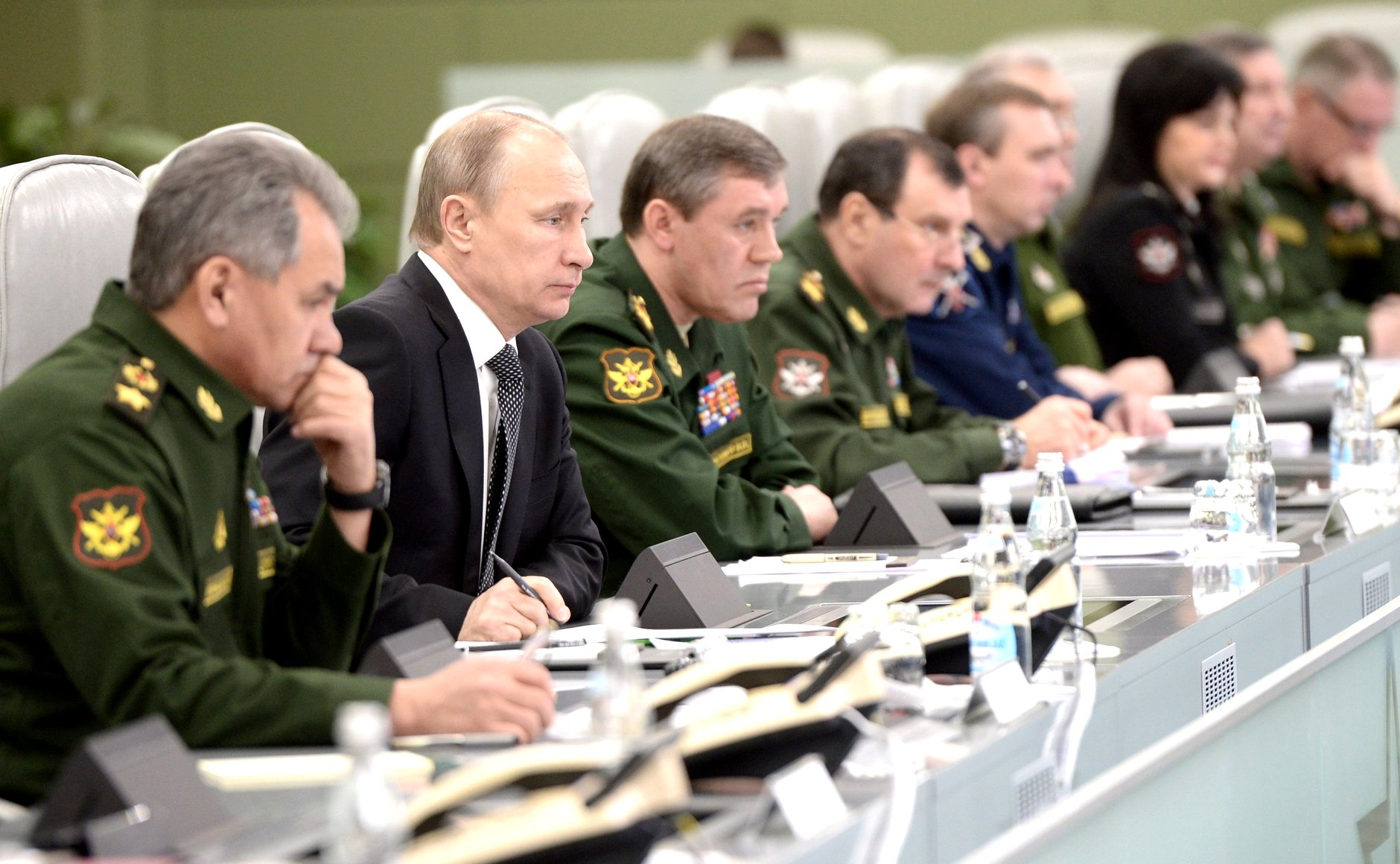 Владимир Путин в Национальном центре управления обороной Российской Федерации